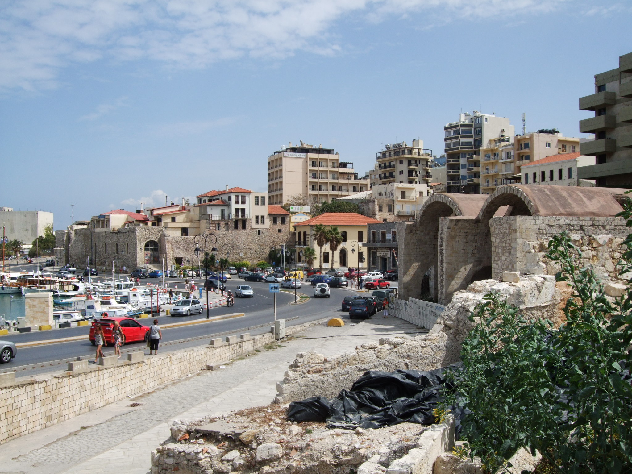 Arsenały weneckie w Iraklio.